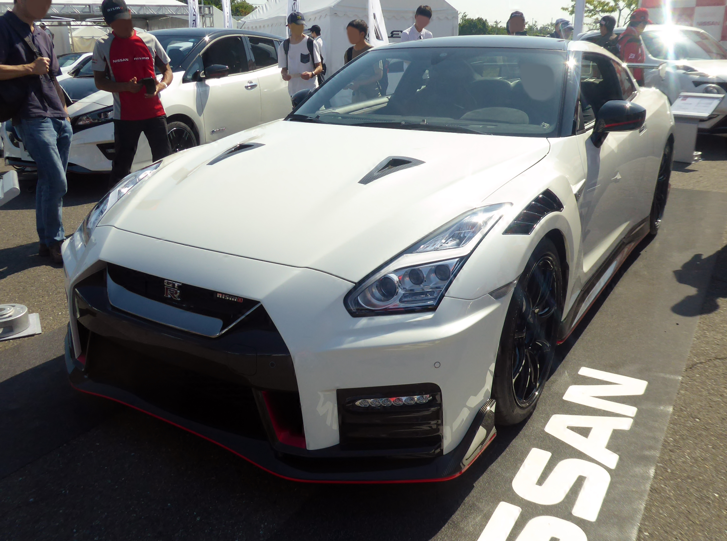 2020年型日産・GT-R NISMOをフロントから撮影。